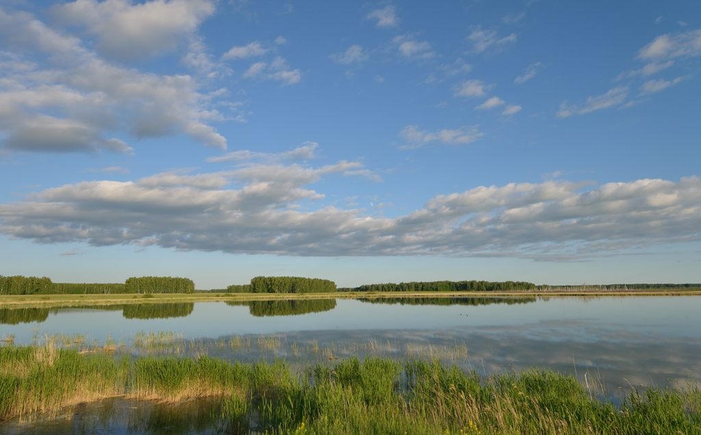 Барабинская низменность летом